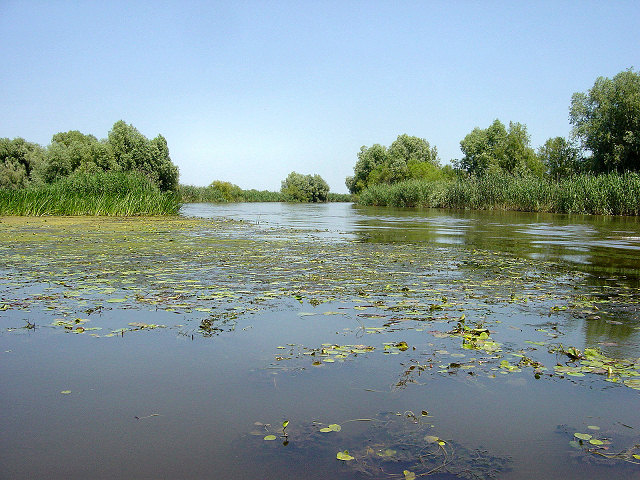 Astrachan, Volgadelta. Eigen foto Mark Voorendt, juli 2005.